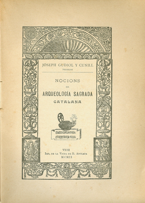 Es tracta de la portada de Nocions d'arqueologia sagrada catalana del Josep Gudiol i Cunill